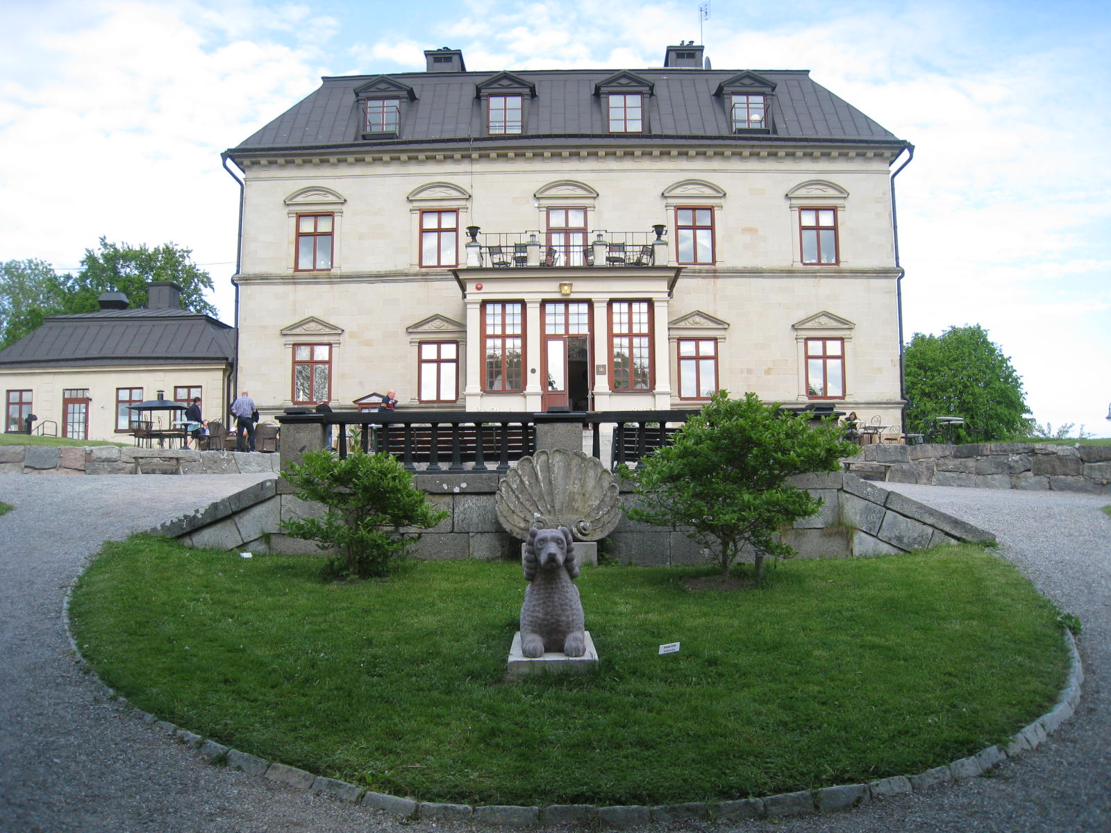 Görvälns slott i Järfälla kommun, Stockholms län.